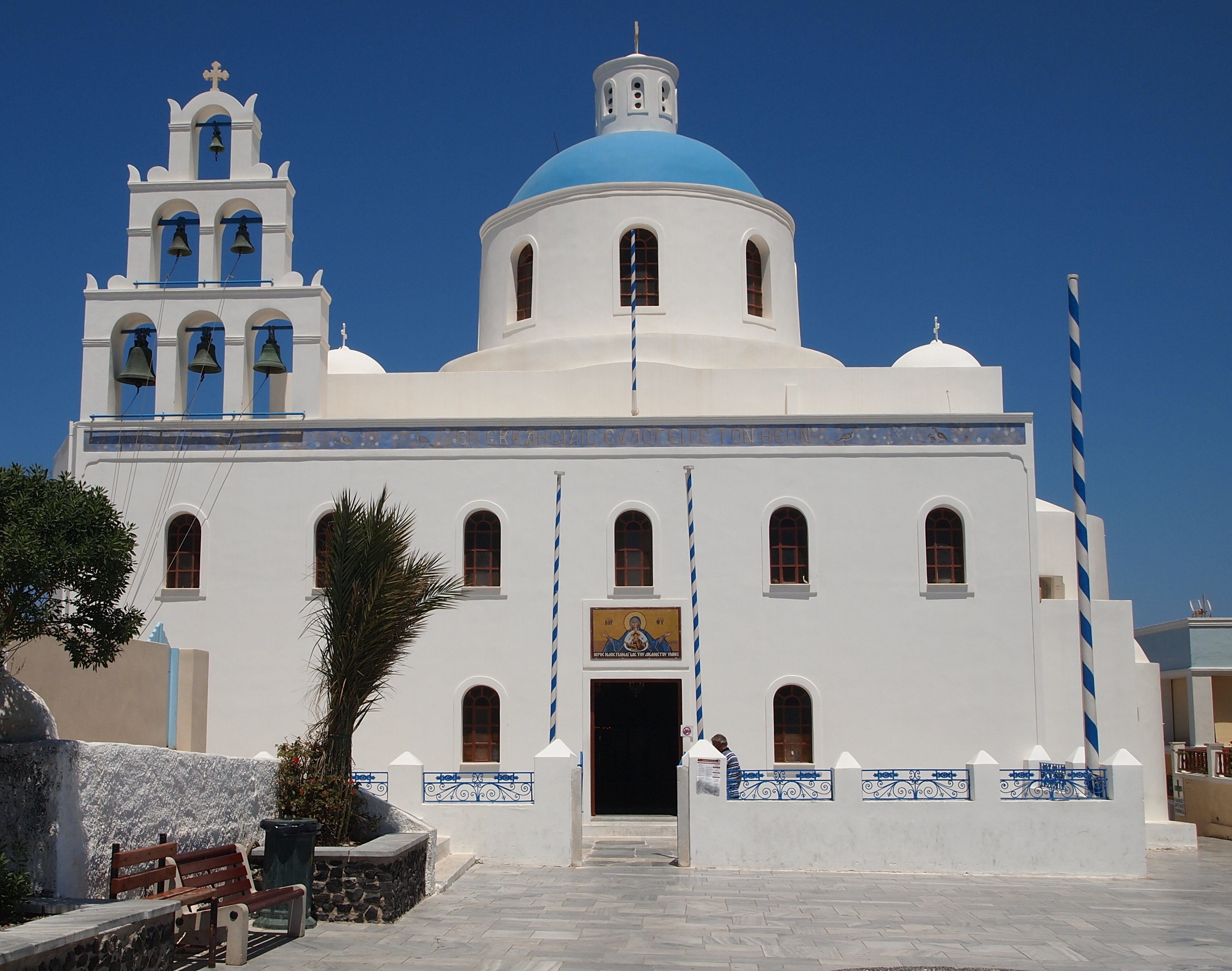 Panagia Platsani Church in Oia, Santorini, Greece